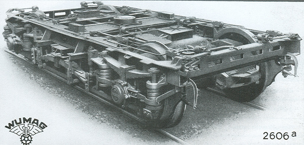 Triebdrehgestell des VT 877 auf einer Werksaufnahme von WUMAG